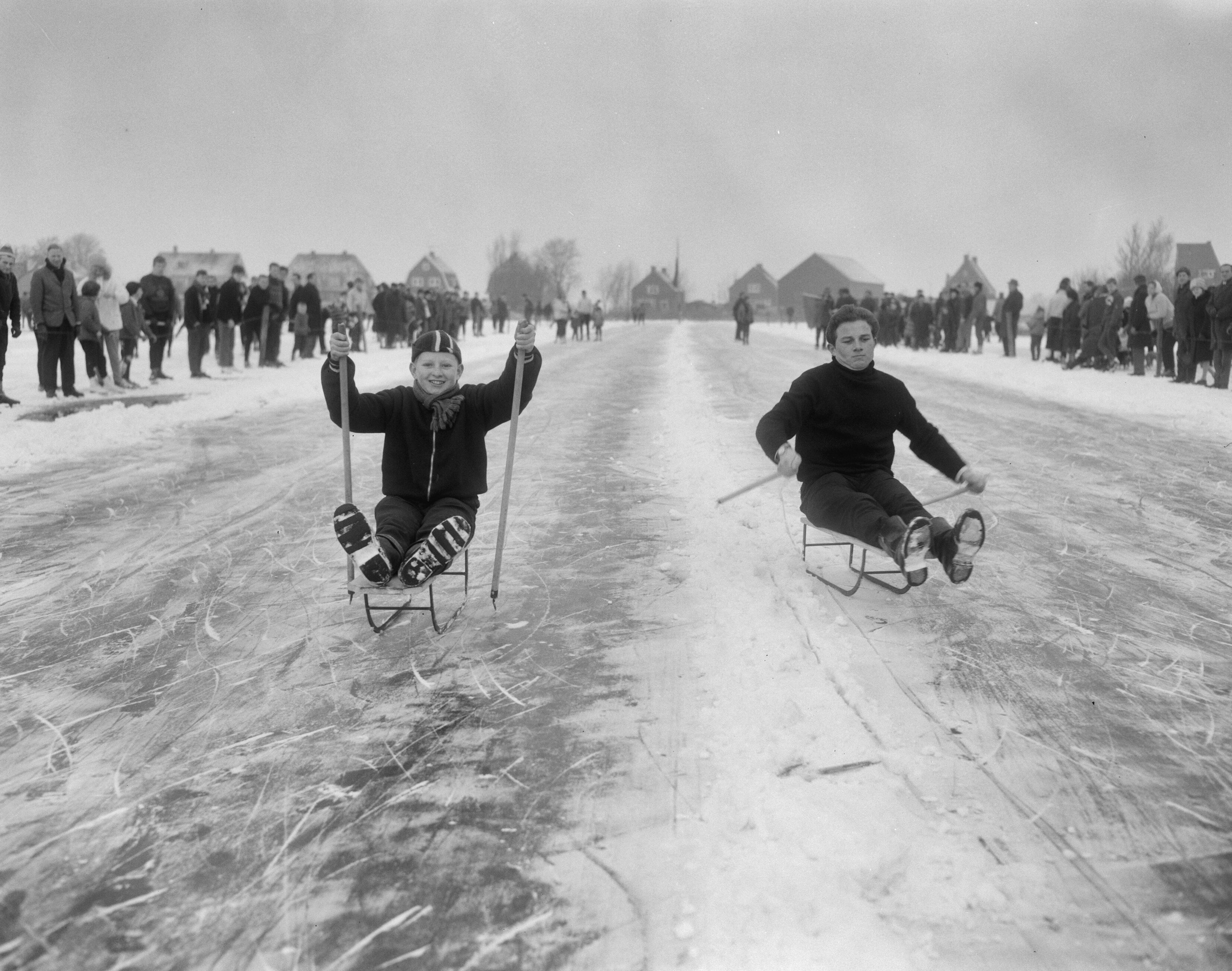 Collectie / Archief : Fotocollectie Anefo Reportage / Serie : [ onbekend ] Beschrijving : Priksleewedstrijden te Haarlemmerliede Datum : 16 januari 1966 Trefwoorden : priksleeen Fotograaf : Bilsen, Joop van / Anefo Auteursrechthebbende : Nationaal Archief Materiaalsoort : Negatief (zwart/wit) Nummer archiefinventaris : bekijk toegang 2.24.01.04 Bestanddeelnummer : 918-6826